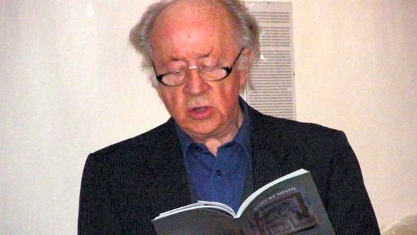 Josef Hrubý - autorské čtení